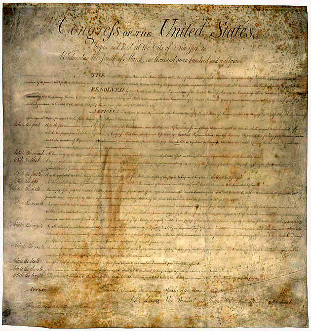 Bill of Rights der USA 1789, in der die ersten zehn Verfassungszusätze niedergelegt sind